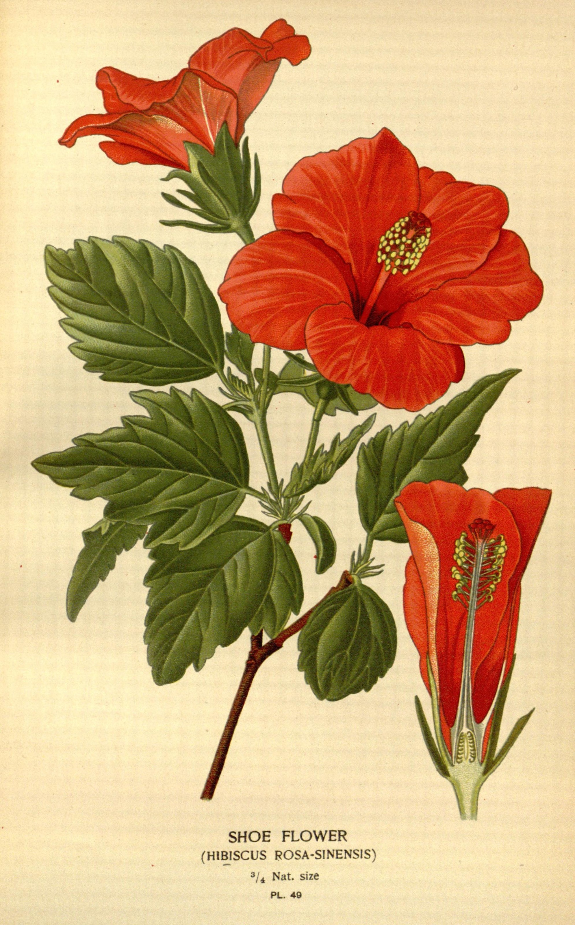 SHOE FLOWER (HIBISCUS ROSA-SINENSIS)